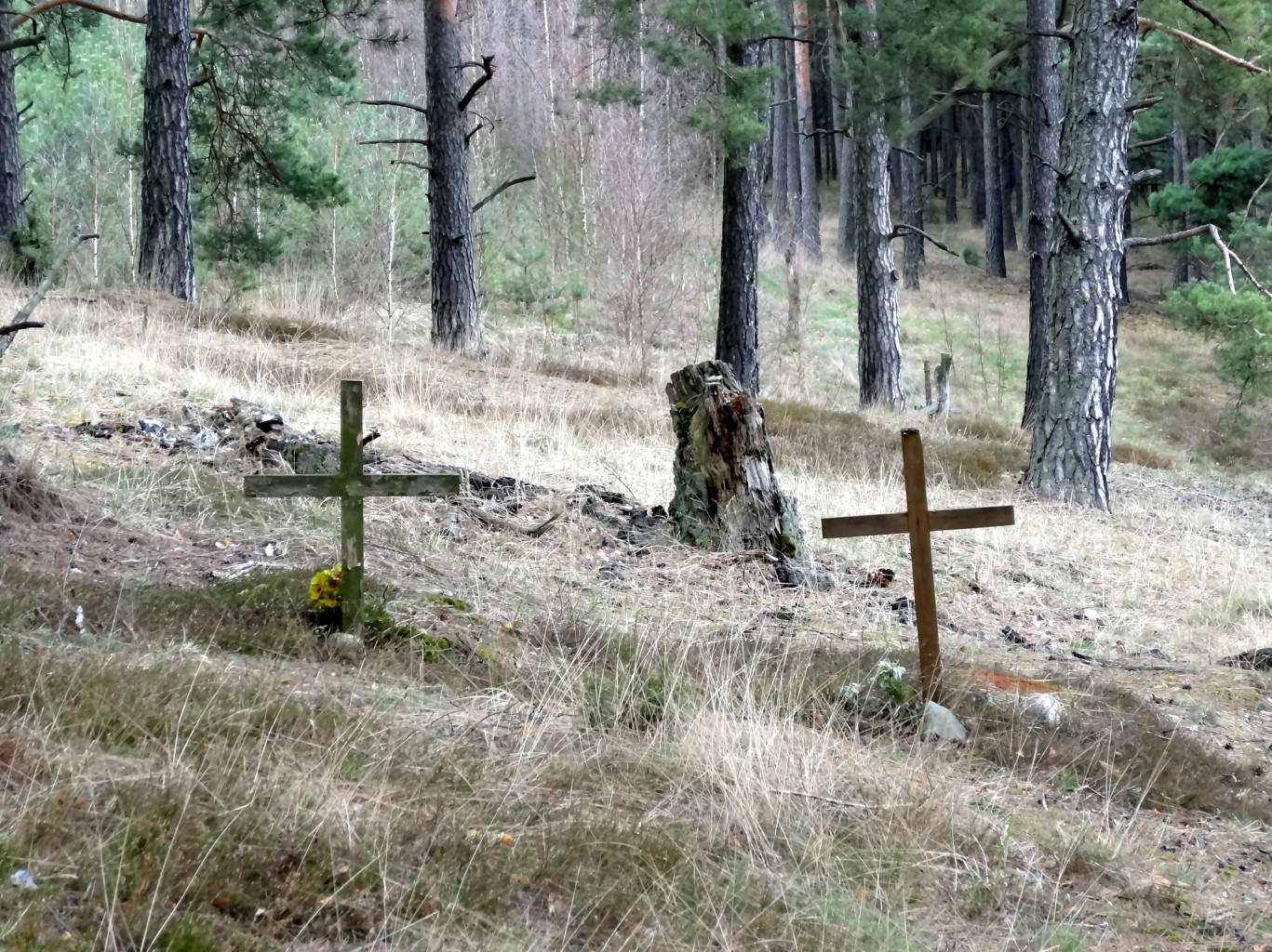 Opuszczony cmentarz w zanikłej wsi Łażyn w Puszczy Bydgoskiej, gmina Nowa Wieś Wielka